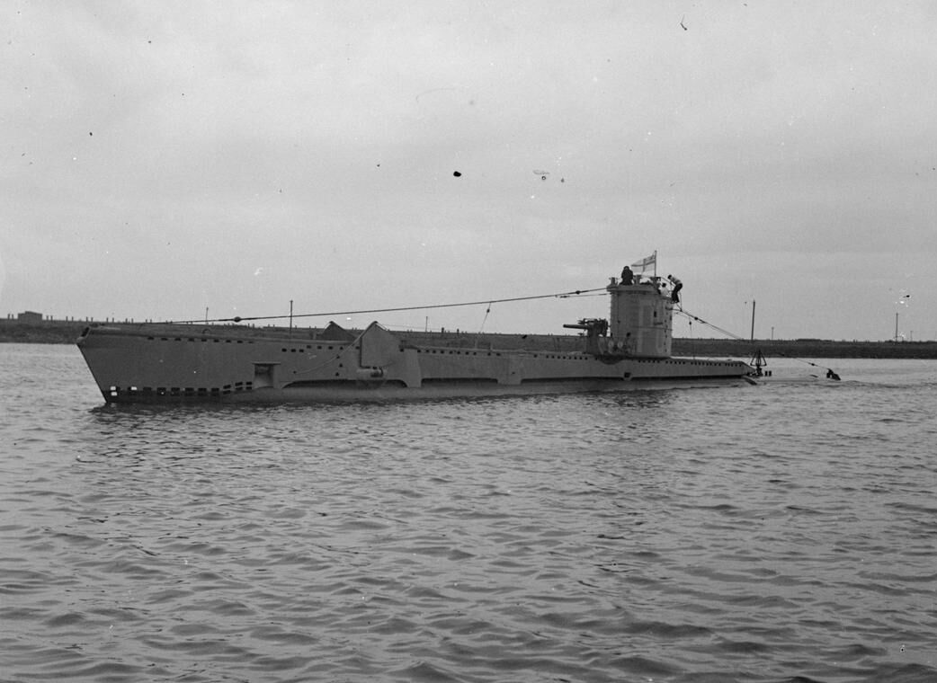 Description: HMSM VENTURER underway. Post-Work: User:Gunfighter-6 Date: 18 August 1943